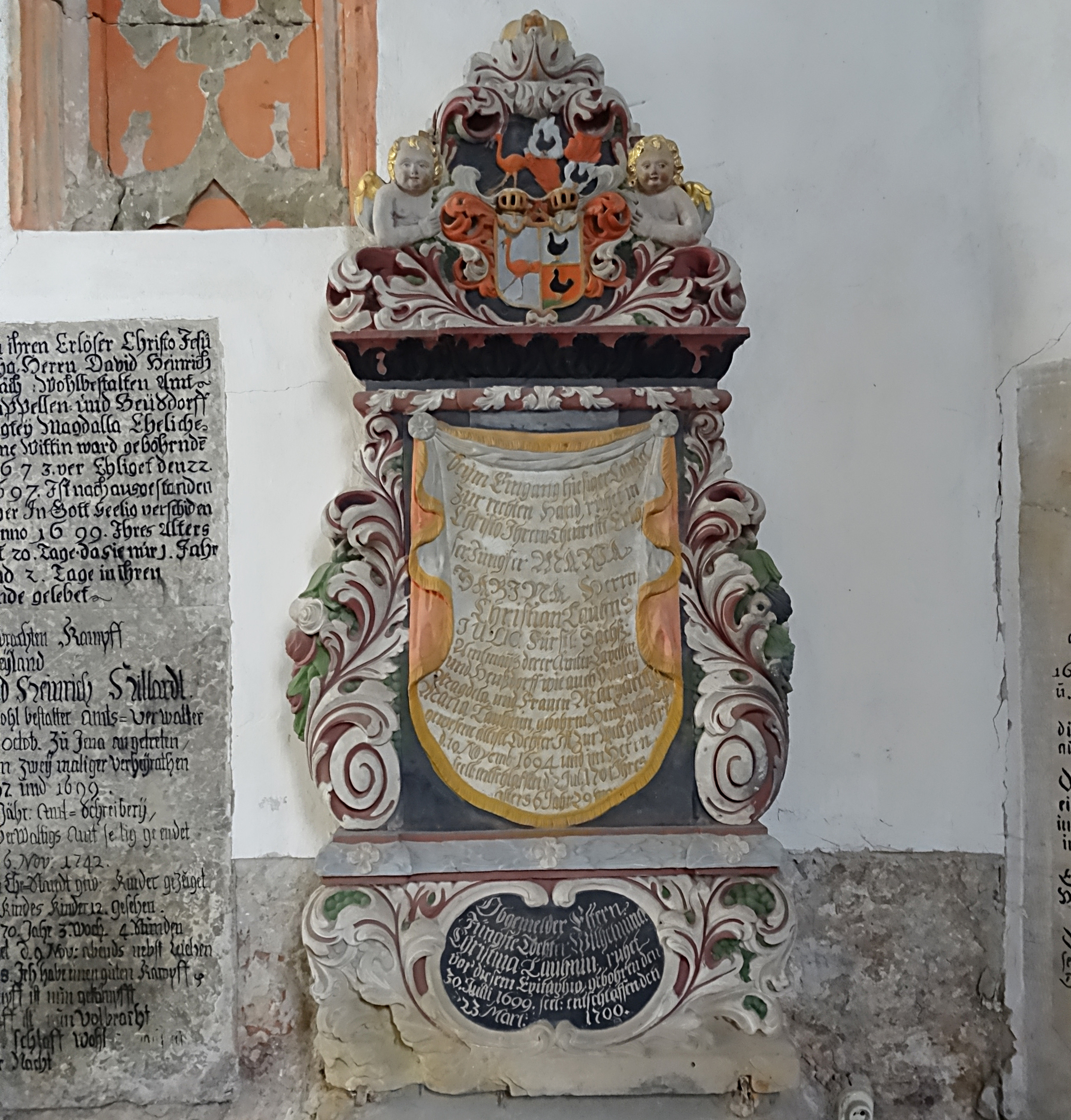 Zahlreiche Epitaphe in der Dorfkirche St. Maria und Bartholomäus Kapellendorf zeugen von der Bedeutung als Begräbnis- und Gedächtnisort in Spätmittelalter und früher Neuzeit.